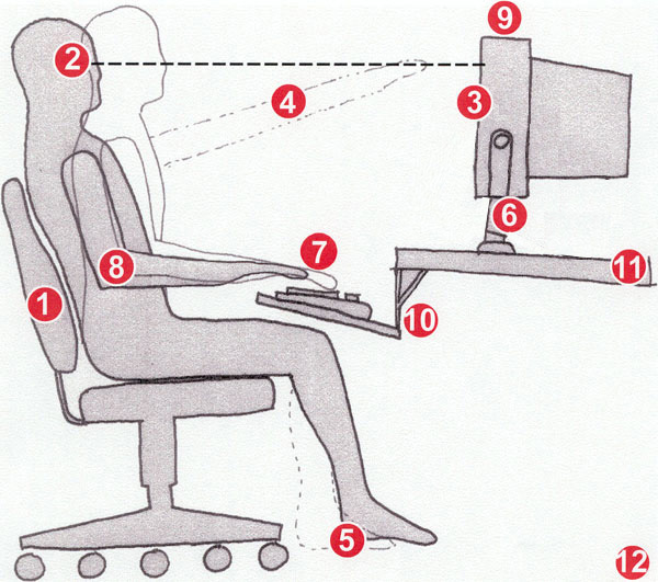 الوضع الصحيح للشاشة